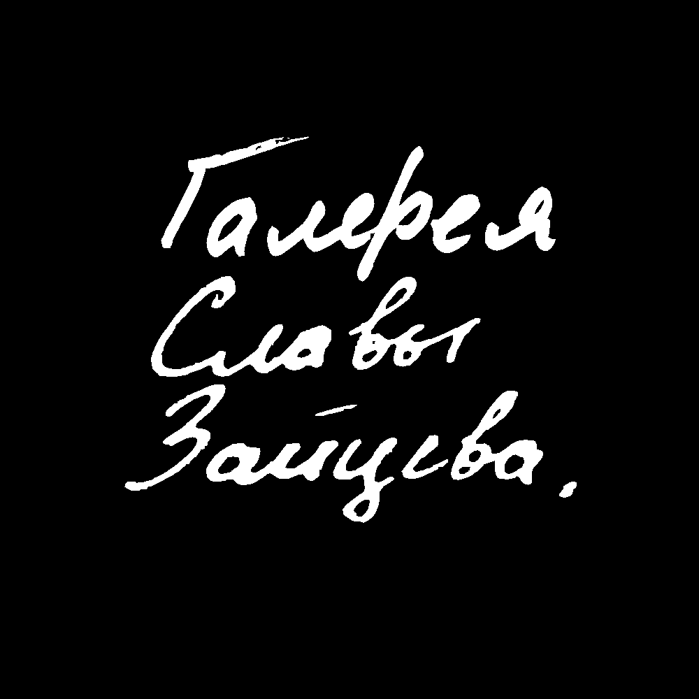 Логотип